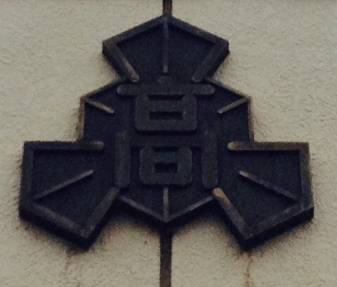 新潟県 長岡市にて撮影。